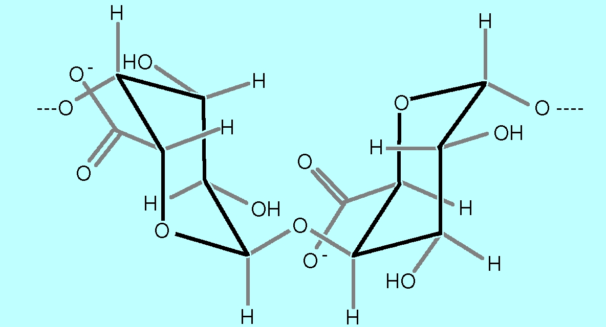 Pectin alpha-D-Glucate Acid dimer